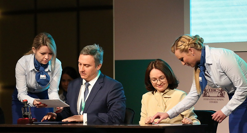 Торжественная церемония памятного гашения почтового блока, посвященного истории и развитию Банка России